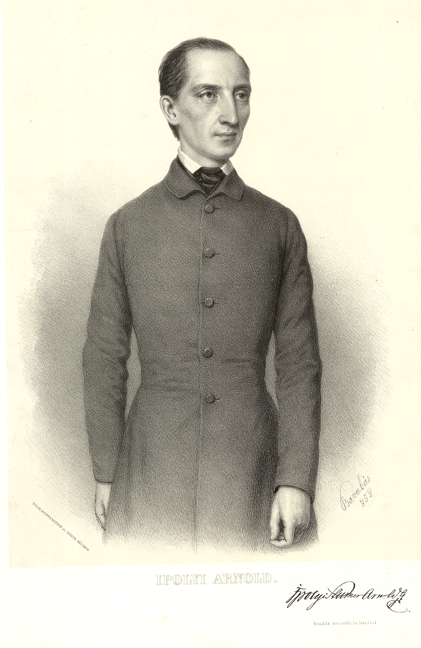 Ipolyi Arnold (Stummer Arnold, Ipolykeszi, 1823. október 18. – Nagyvárad, 1886. december 2.) besztercebányai majd nagyváradi püspök, valóságos belső titkos tanácsos, az MTA igazgató tagja, a Kisfaludy Társaság tagja, a törökszentmiklósi templom plébánosa (róla nevezték el a város könyvtárát). A magyar művészettörténet-kutatás egyik úttörője. Terényi Lajos alispán és országgyűlési képviselő bátyja.